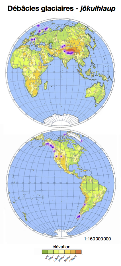 Débâcles glaciaires dans le monde.